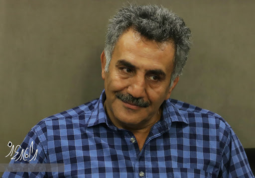 بهروز یاری